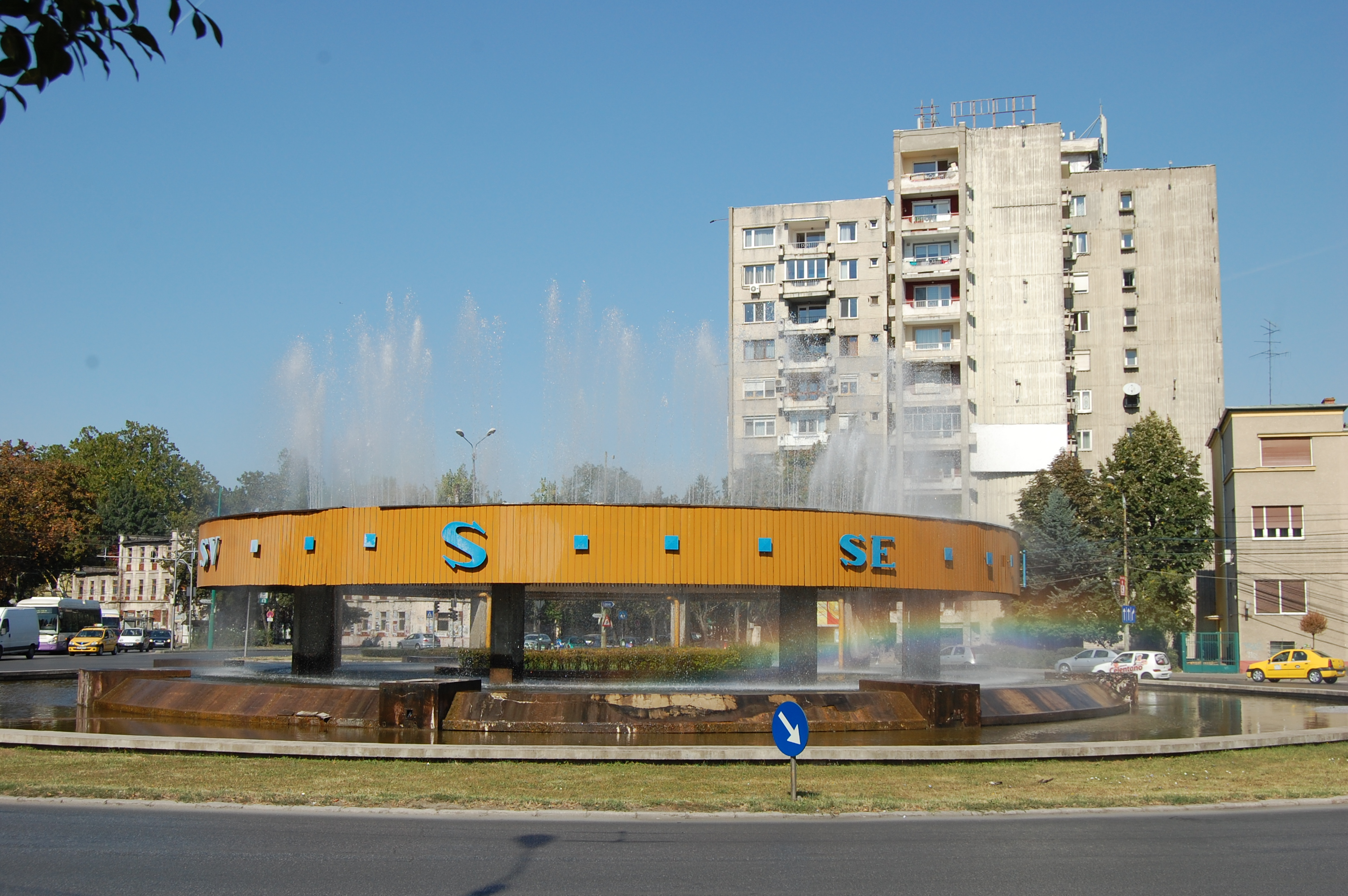 Puncte cardinale, Timisoara